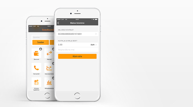 Swedbanki mobiiliäpp